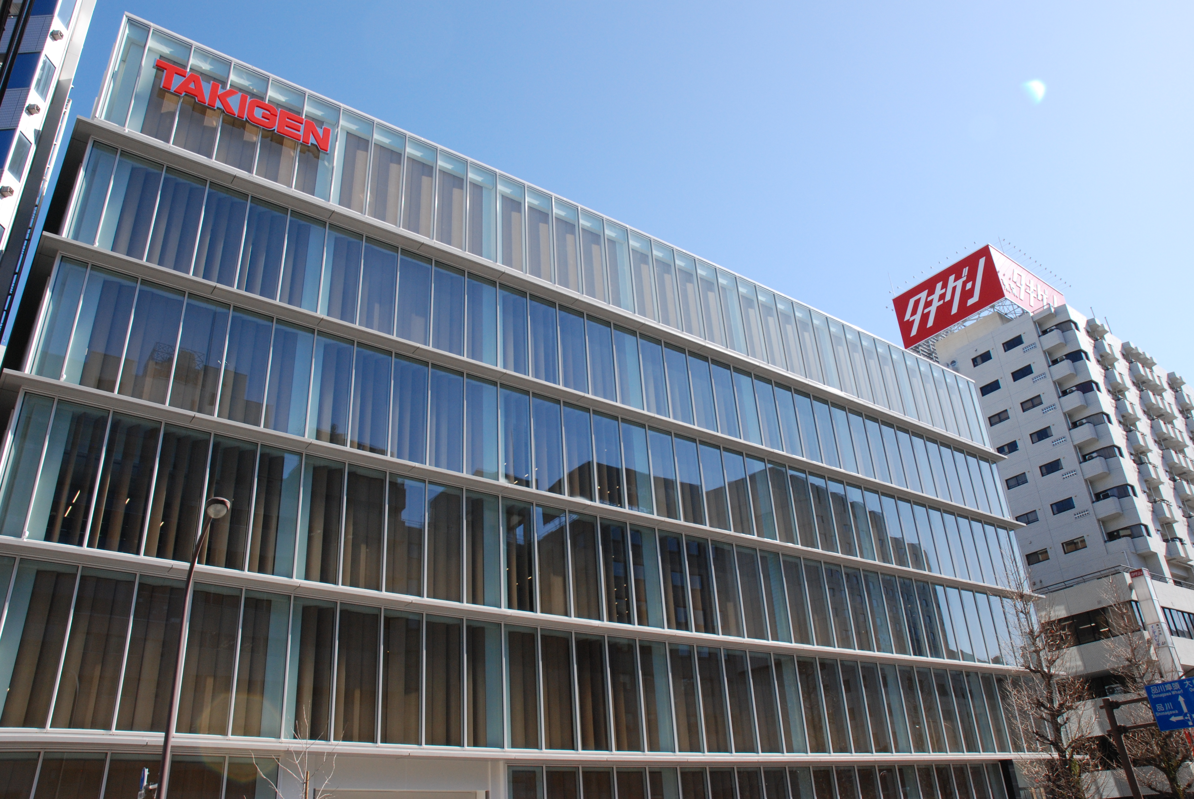 タキゲン本社